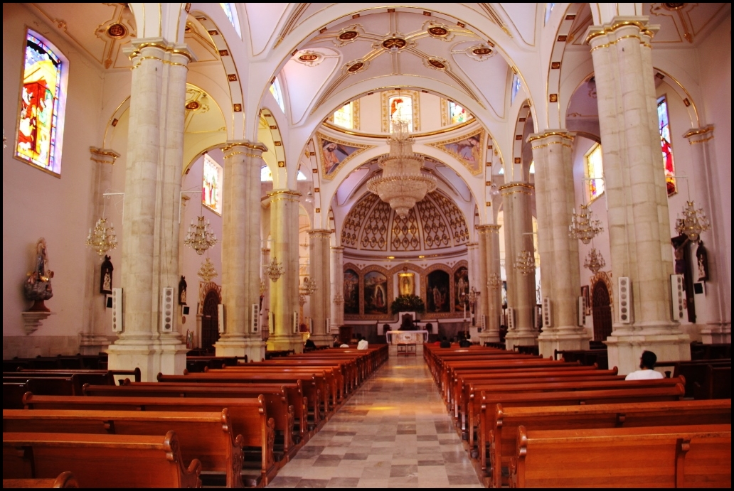 Basilica de Santa Maria de Guadalupe (Pachuca) Estado de Hidalgo,México